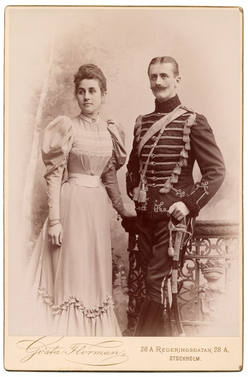 Löjtnanten Wilhelm von Geijer och hans hustru grevinnan Irma von Geijer, född von Hallwyl. 1890-tal.